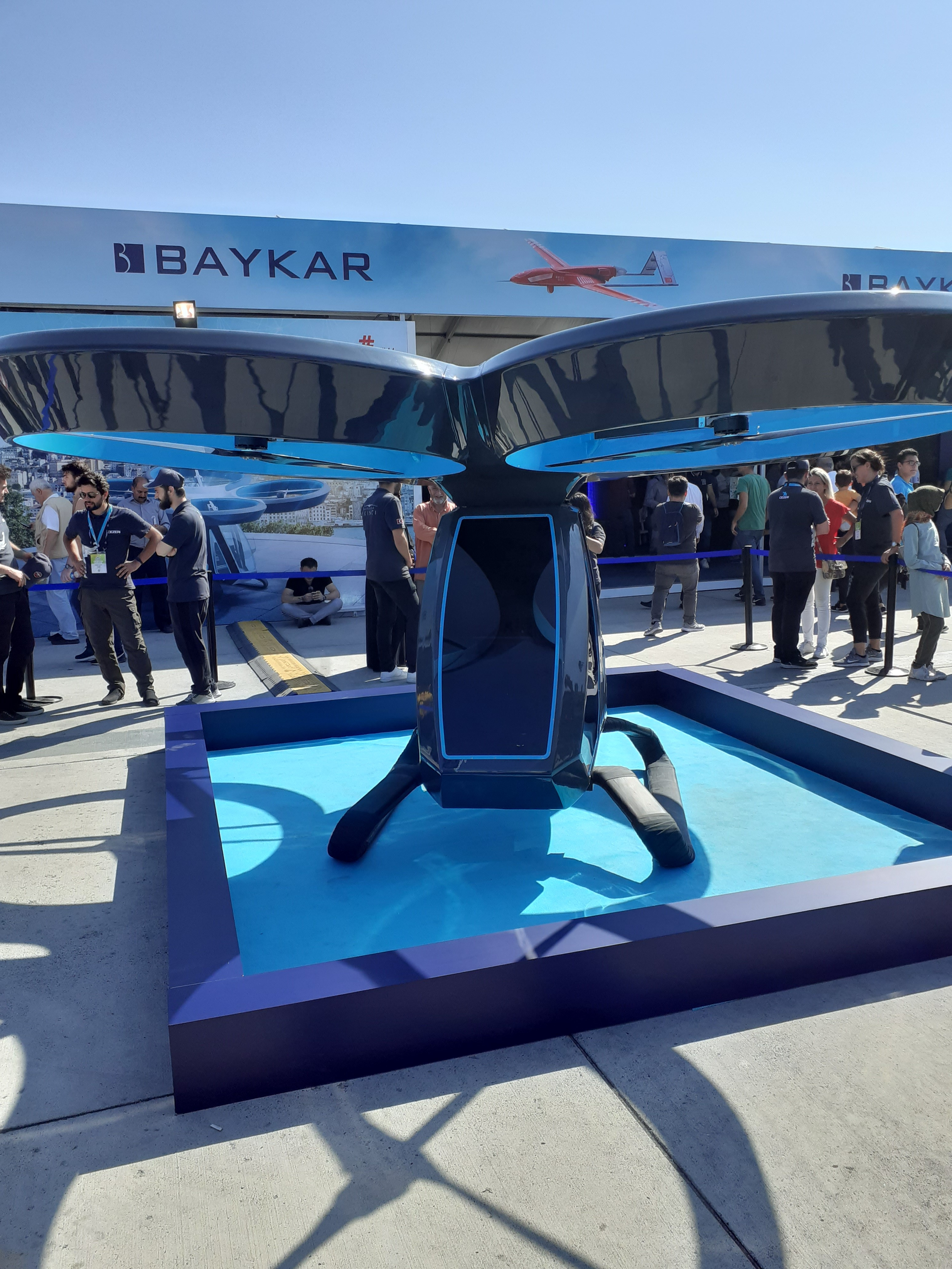 Cezeri Teknofest 2019'da.